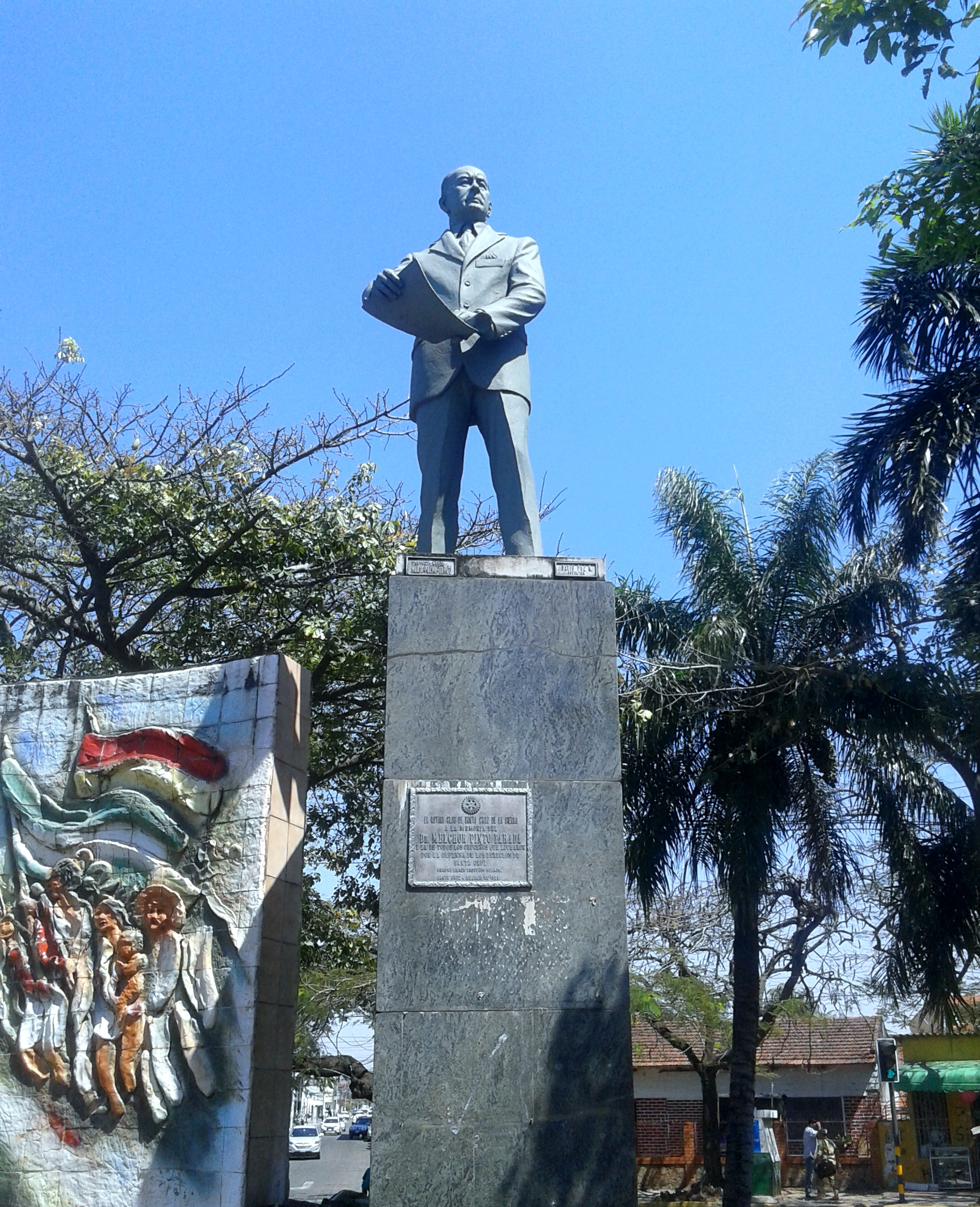 Melchor Pinto Parada This medium shows the protected monument with the number S/00-026 in Bolivia.